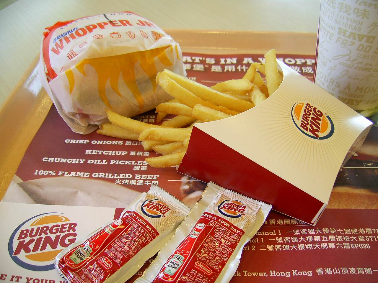 小華堡餐